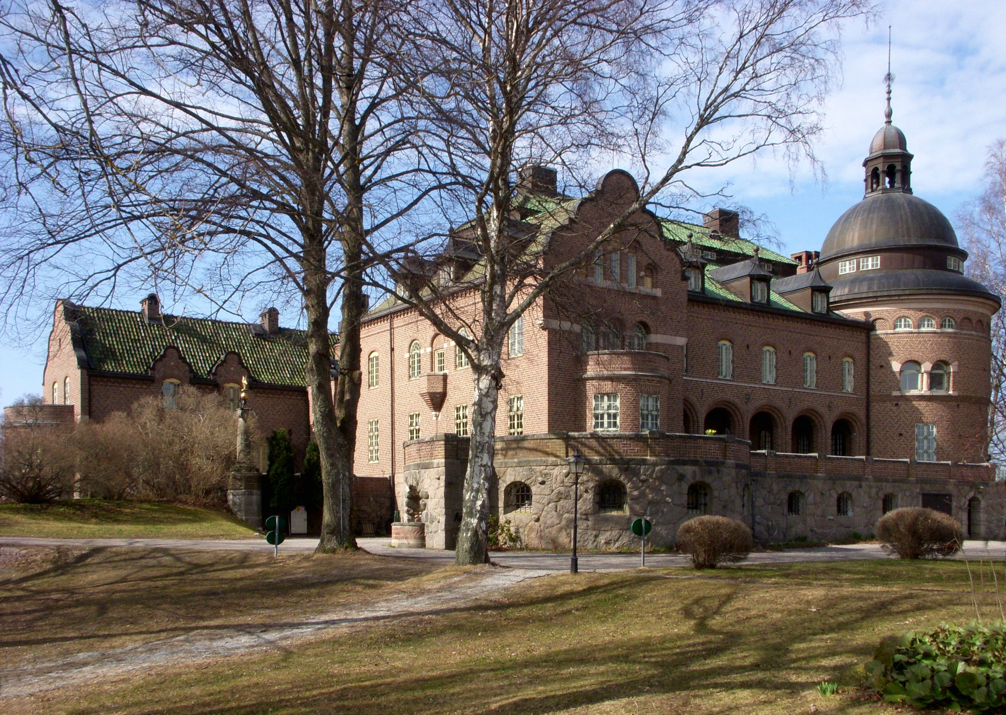 Ängsholm, även Engsholms slott i Ytterjärna socken, Södertälje kommun, Stockholms län